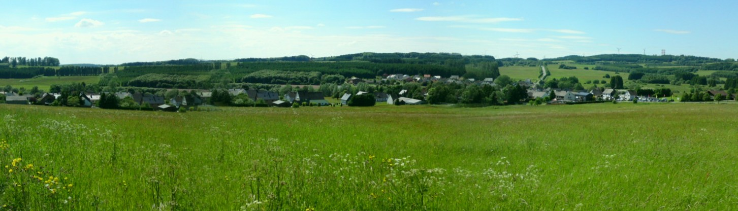 Panorama-Ansicht von Nister-Möhrendorf